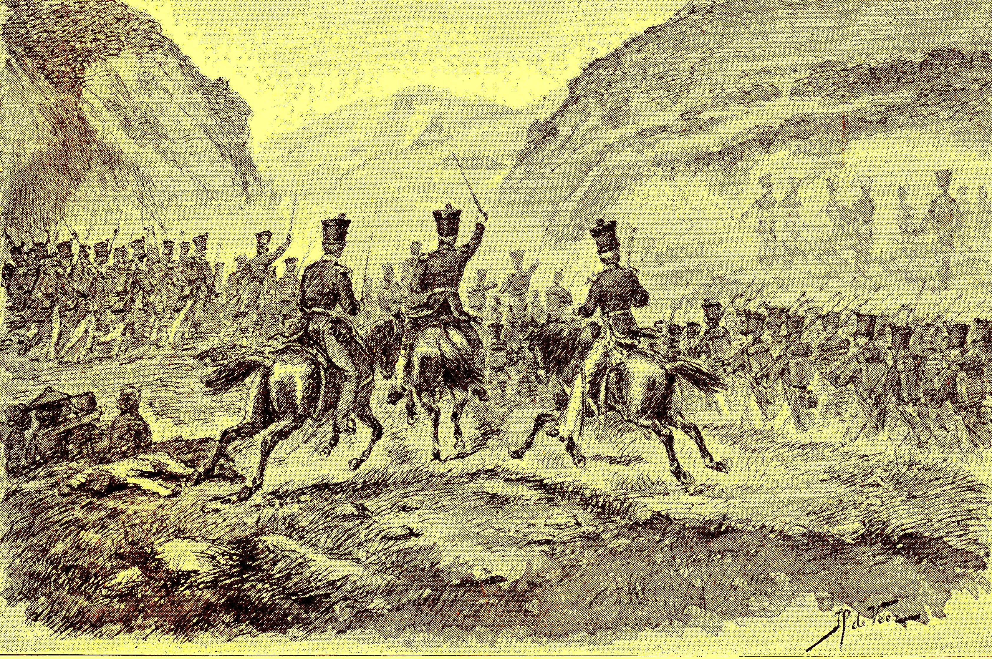 Luitenant kolonel Raaff voor de versterkingen van Tandjong Alam